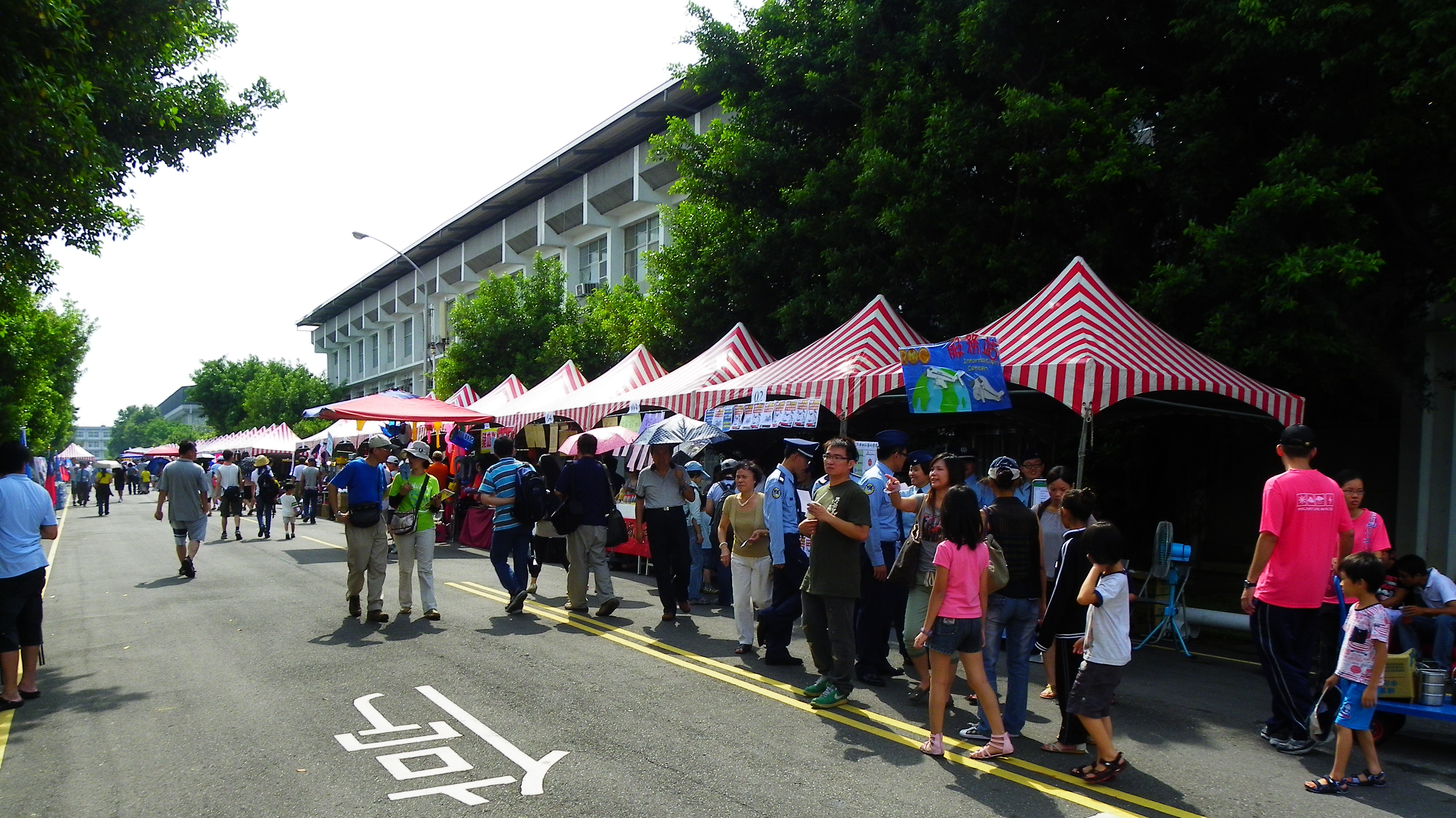 2011年空軍松山基地營區開放活動的園遊會攤位。